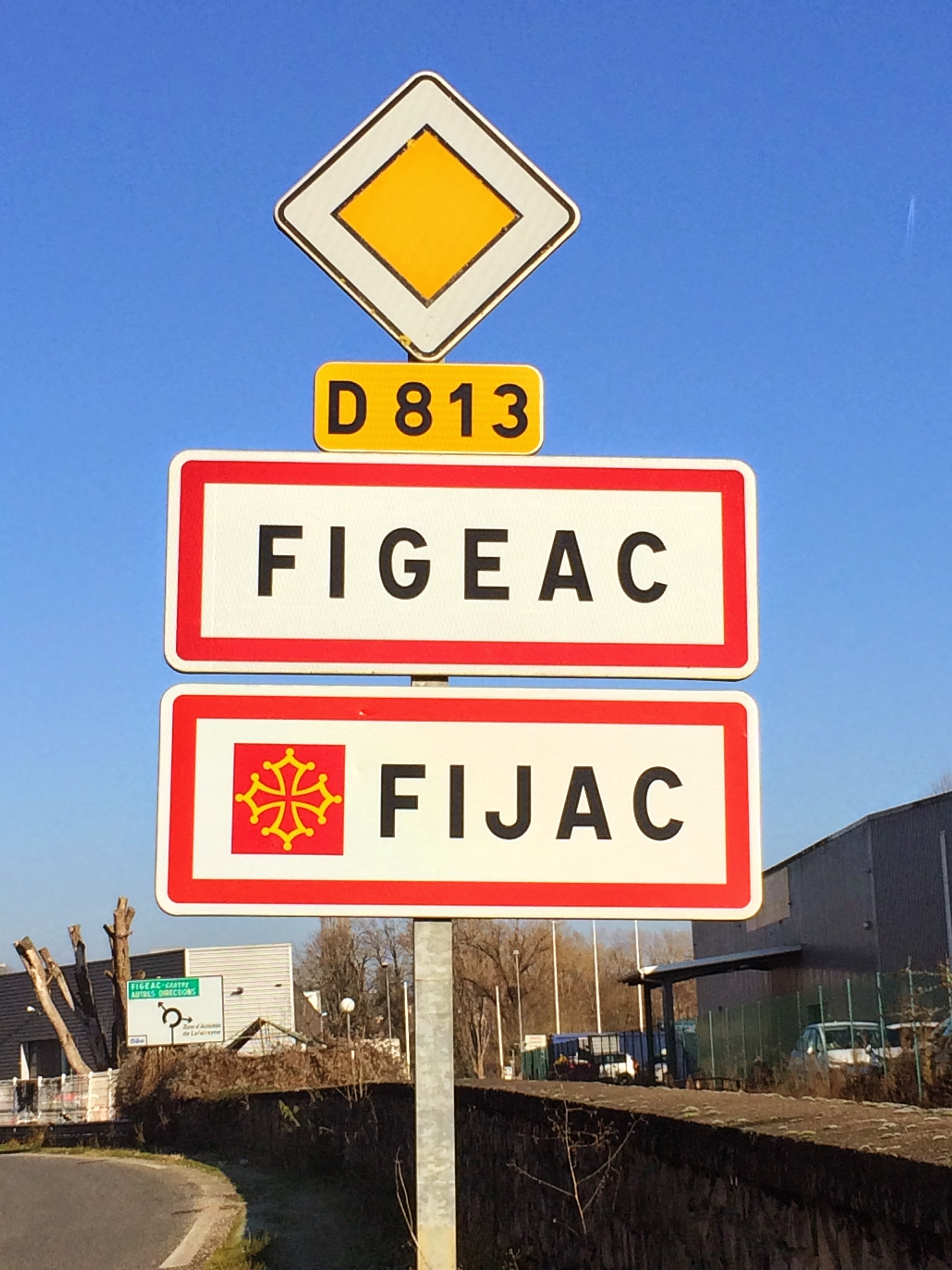 Panèl d'intrada de Fijac.